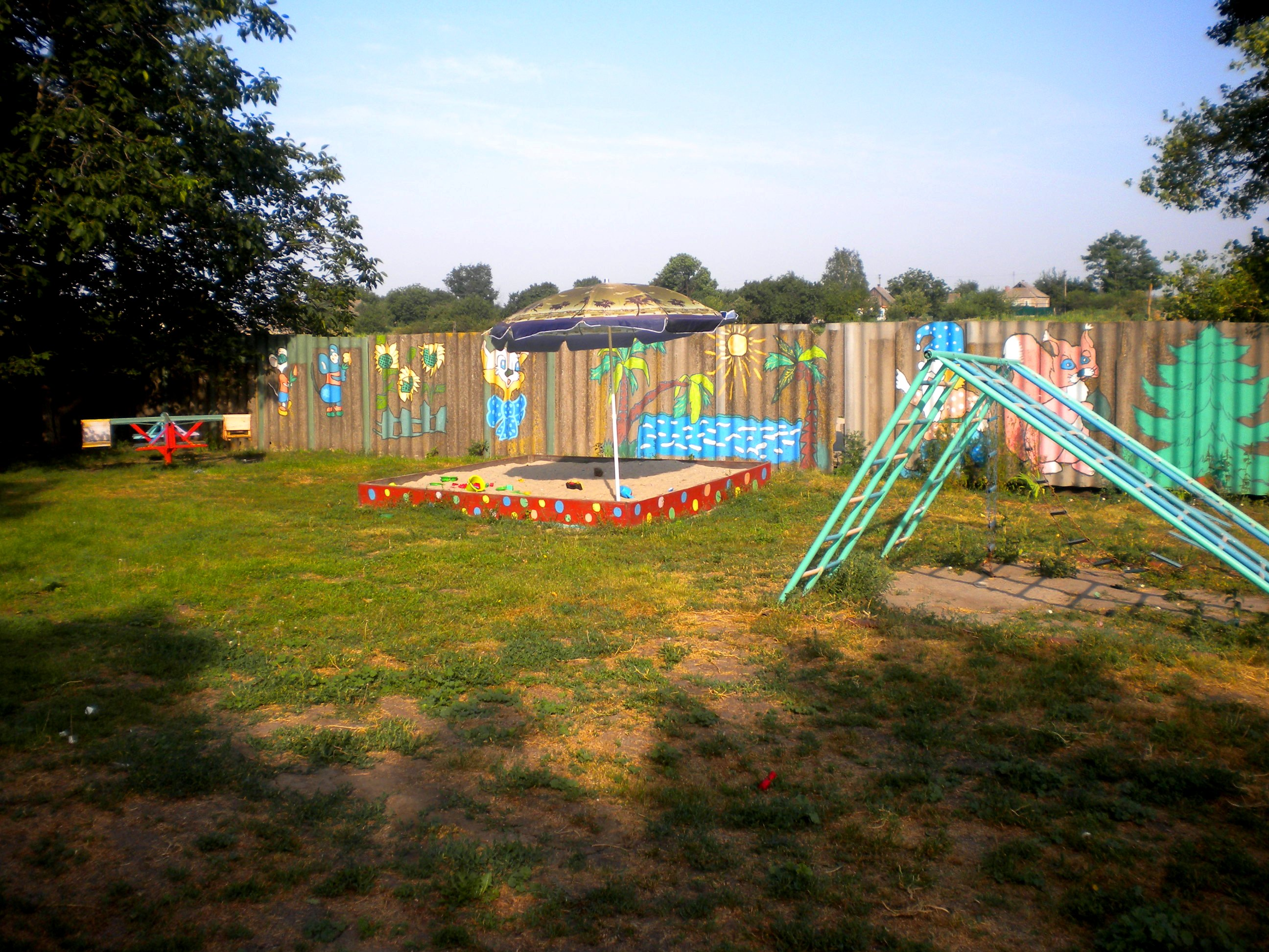 детский сад